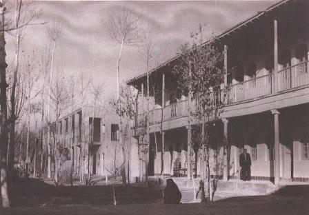 نخستین نمای خاوران (شرقی) بیمارستان مسیح بَـرِ خیابان شهناز که بعدها ویران شد و نمای کنونی جایگزین آن شد